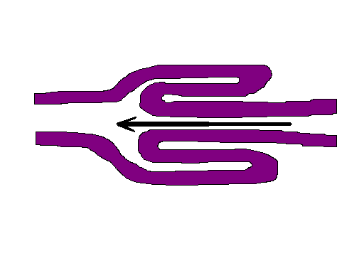 Schematische Darstellung einer Darminvagination. Autor: Kalumet, selbst erstellt Datum: 25.08.2005